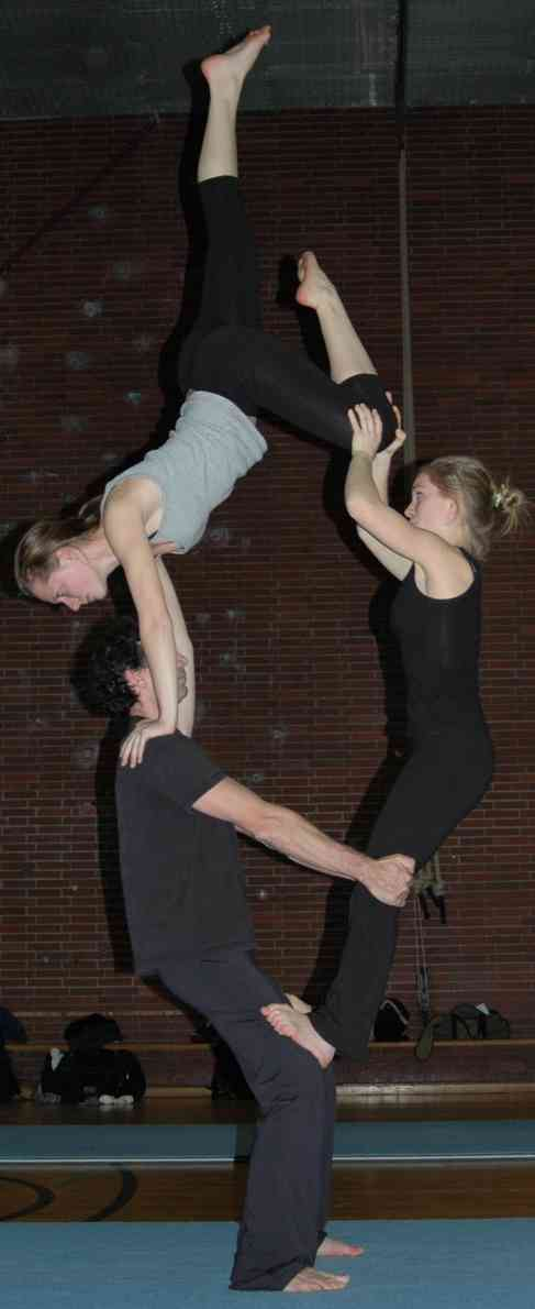 Akrobatikfigur: Stehen auf den Oberschenkeln mit Handstand auf den Schultern